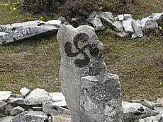 Euskal Herriko erdiguneko mugarria lauburuarekin